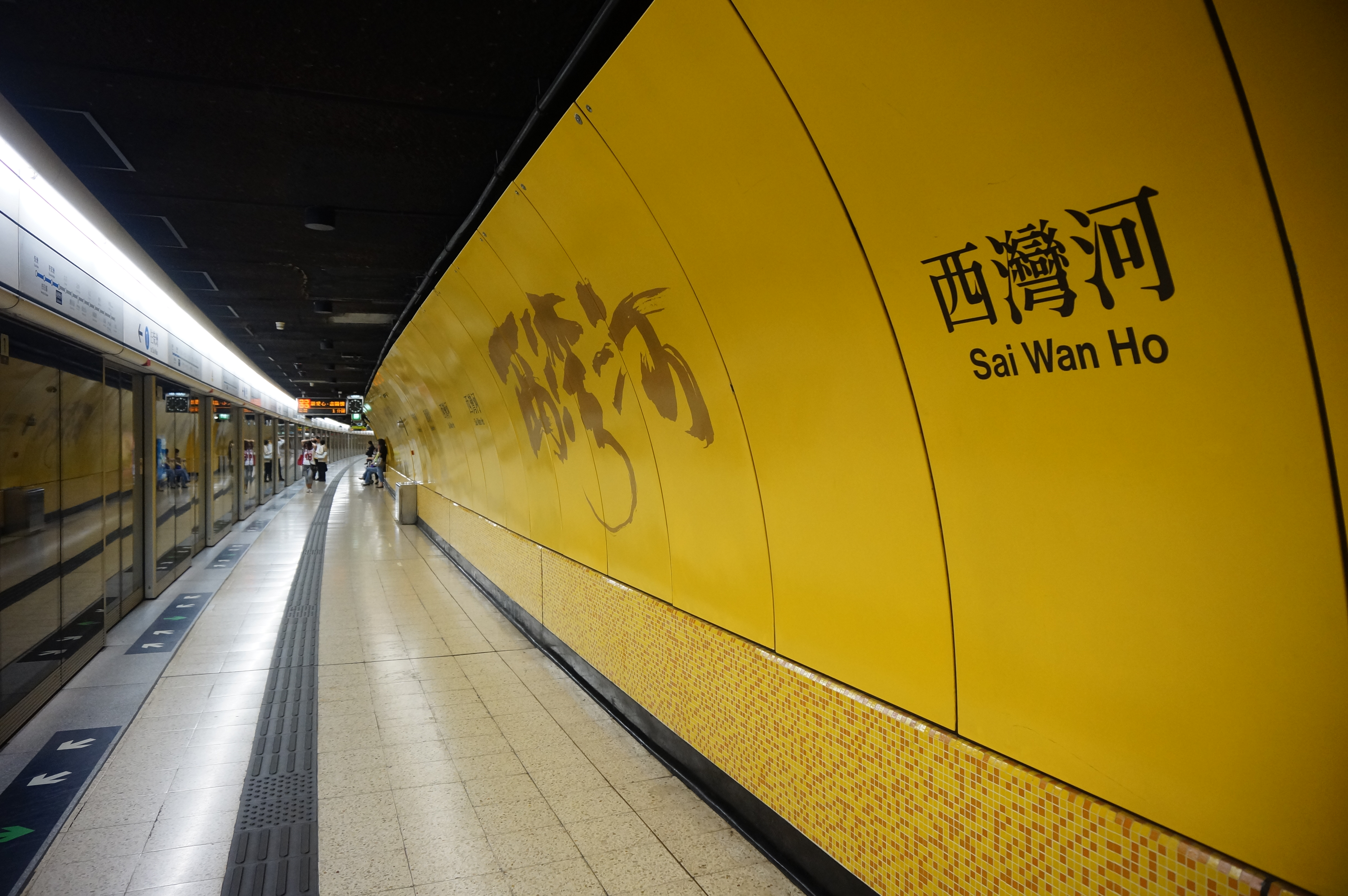 港鐵西灣河站月台